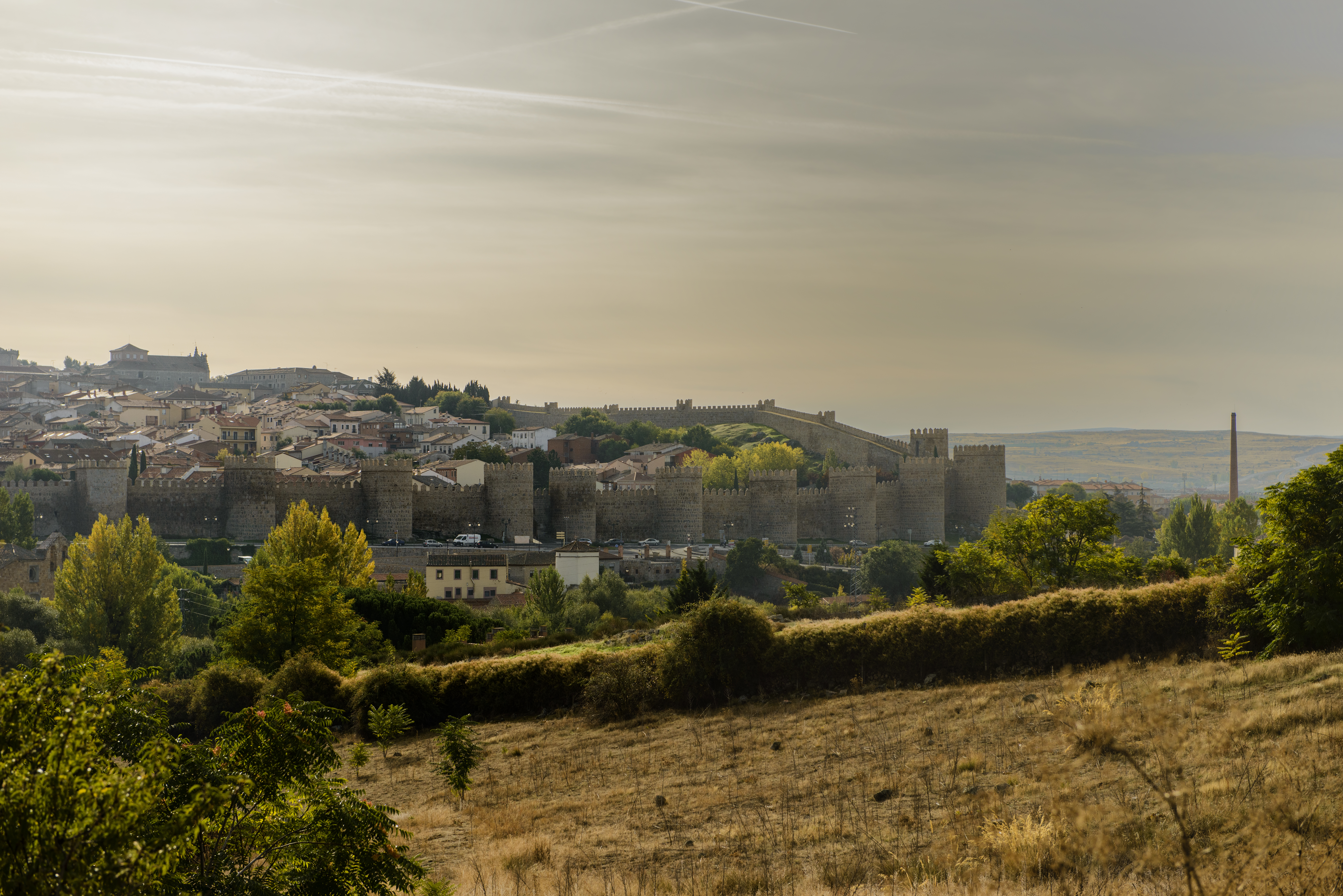 Ávila, provincia de Ávila, Castilla y León, España.